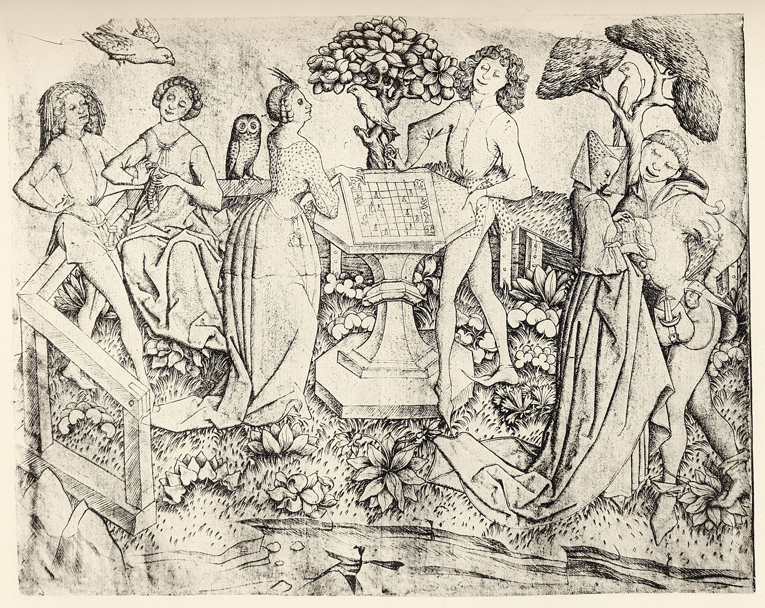 Großer Liebesgarten mit Schachspielern. 1460-1467